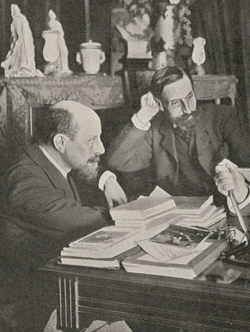 Les frères Hillemacher à l'écoute de la première lecture par Pierre-Barthélemy Gheusi de son livret pour l'opéra "Orsola", photographie publiée dans "L'Art du théâtre" en 1902